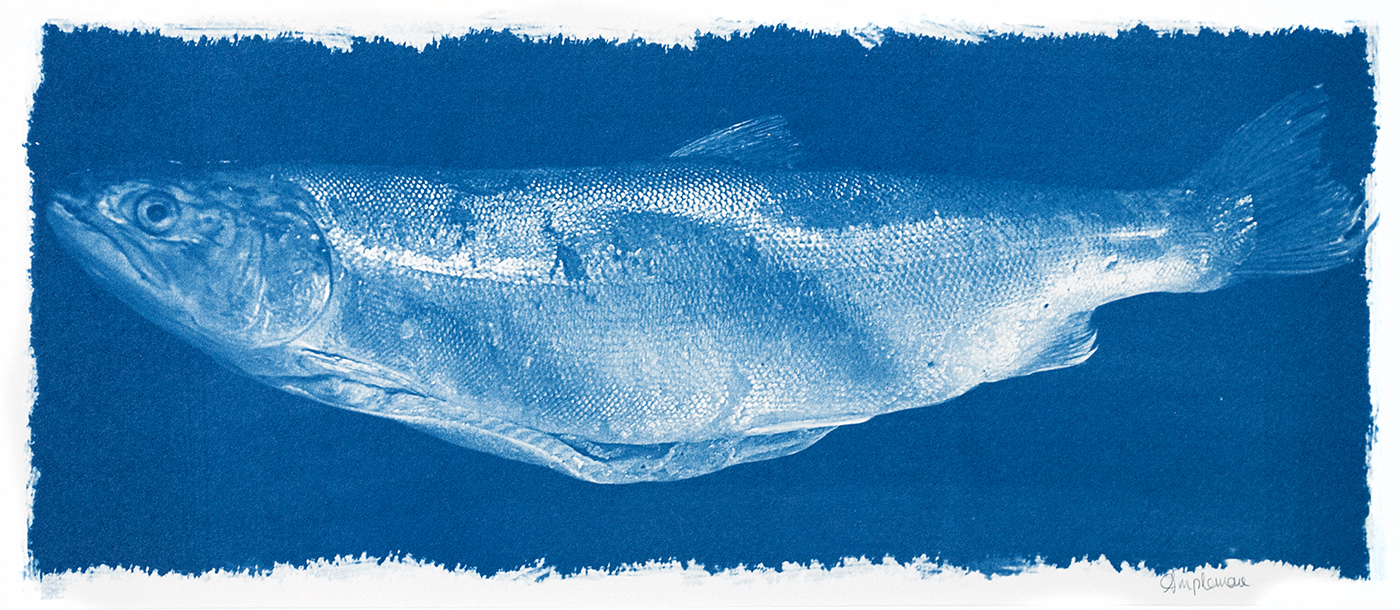 Photographie d'un saumon et faisant usage du cyanotype, 2012.